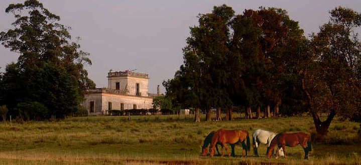 Historic Estancia, Southern Departamento Florida, Uruguay